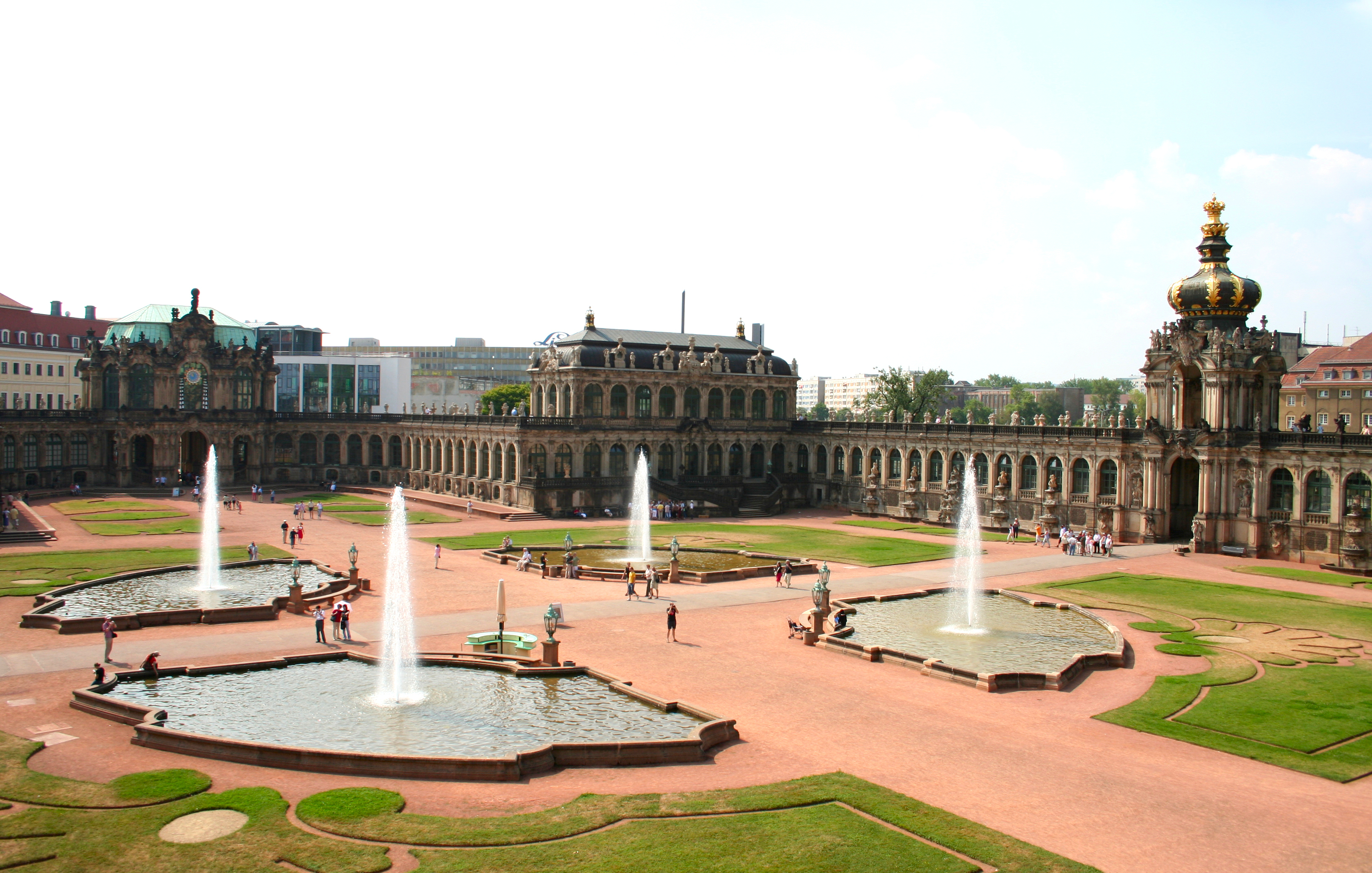 Zwinger, Dresden, Germany